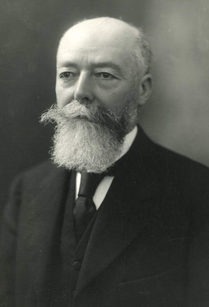 Paul Doumer